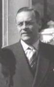 Herman Witte in 1952